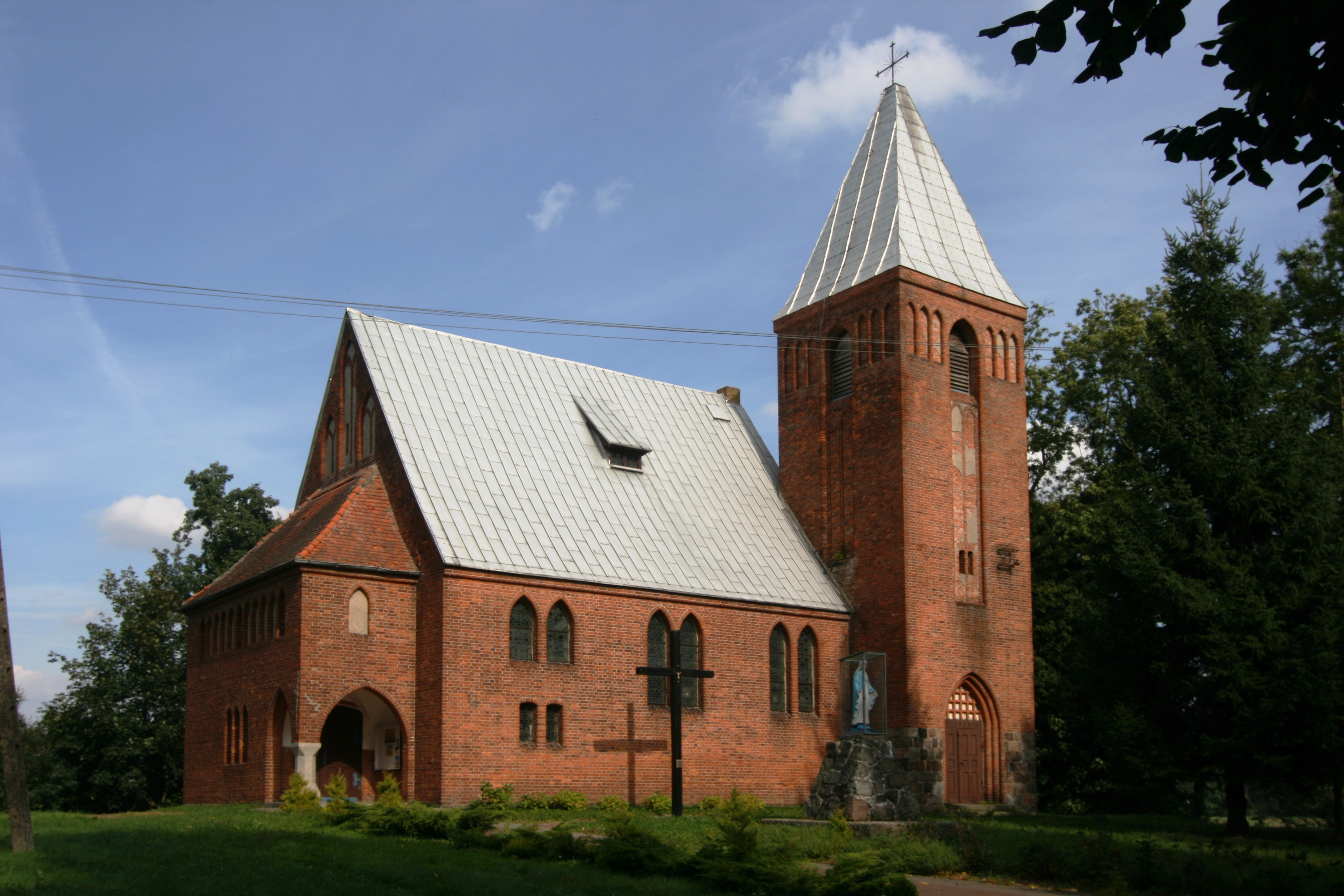 Kościół pw św. Kazimierza w Karwinie w powiecie białogardzkim